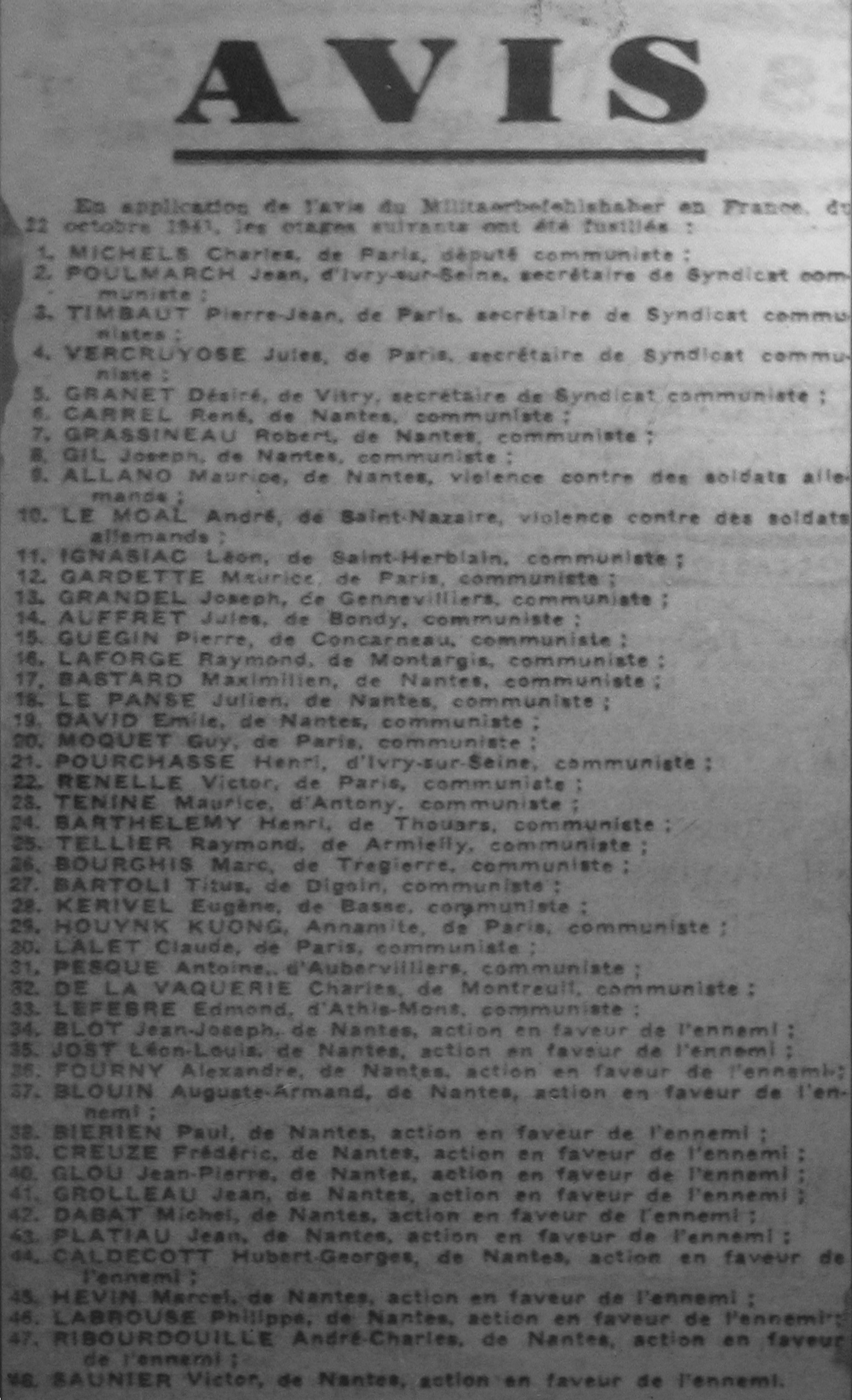 Exposition métro Guy Môquet, Paris. Avis d'exécution d'otages par les nazis le 22 octobre 1941 paru dans le journal « L'Œuvre » du 23 octobre 1941.